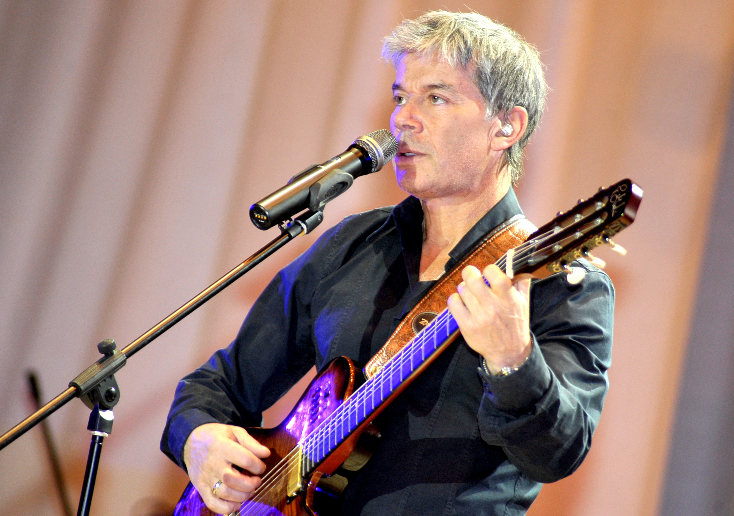 Газманов, Олег Михайлович . фото Чуприна Вадим